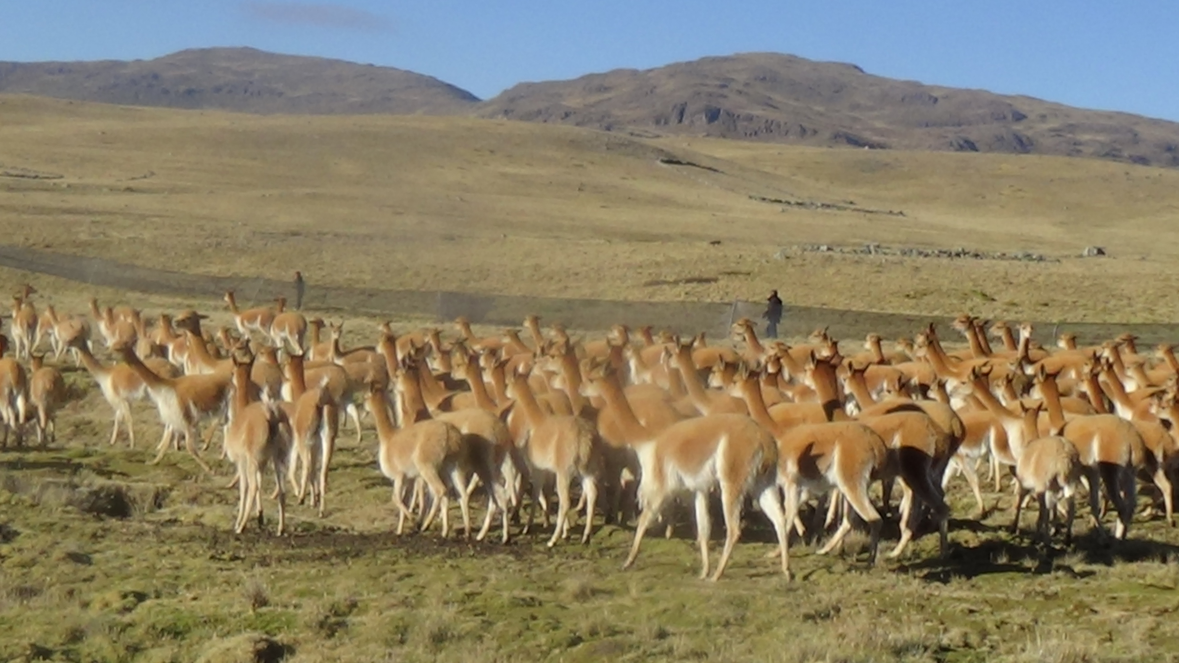 vicuñas en hualla simplemente hermoso